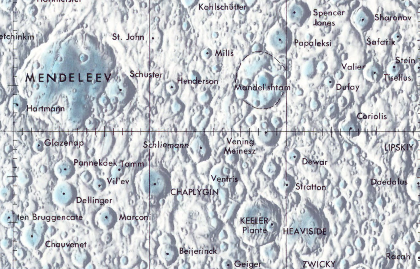 Cráter lunar Stratton. Localización. (Lunar Chart LPC1. Second Edition)